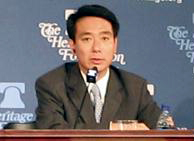 第31回日米安全保障専門議員交流で討論する前原誠司。